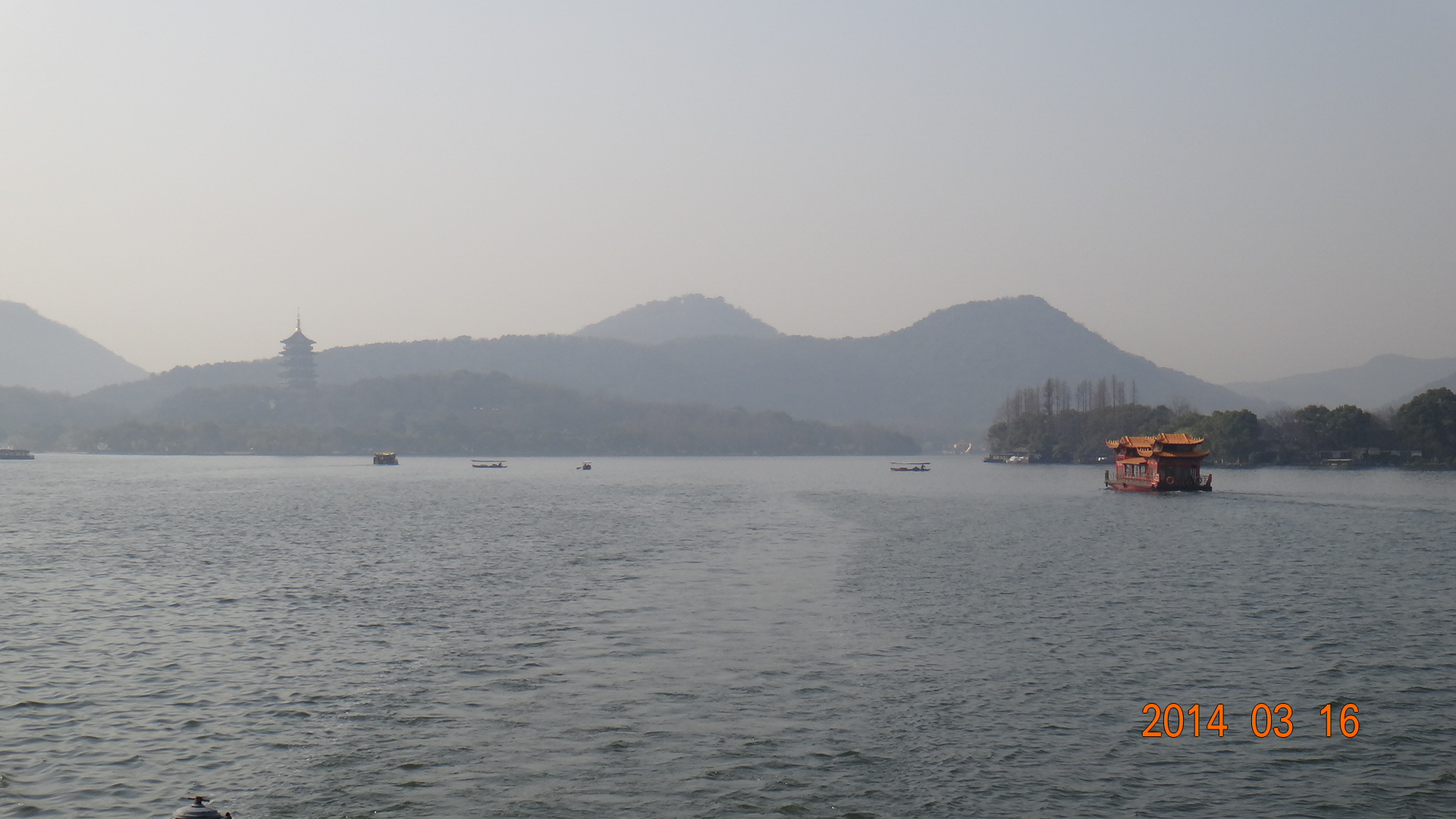 杭州 西湖游船（背景：雷峰塔 玉皇山 小瀛洲 ）